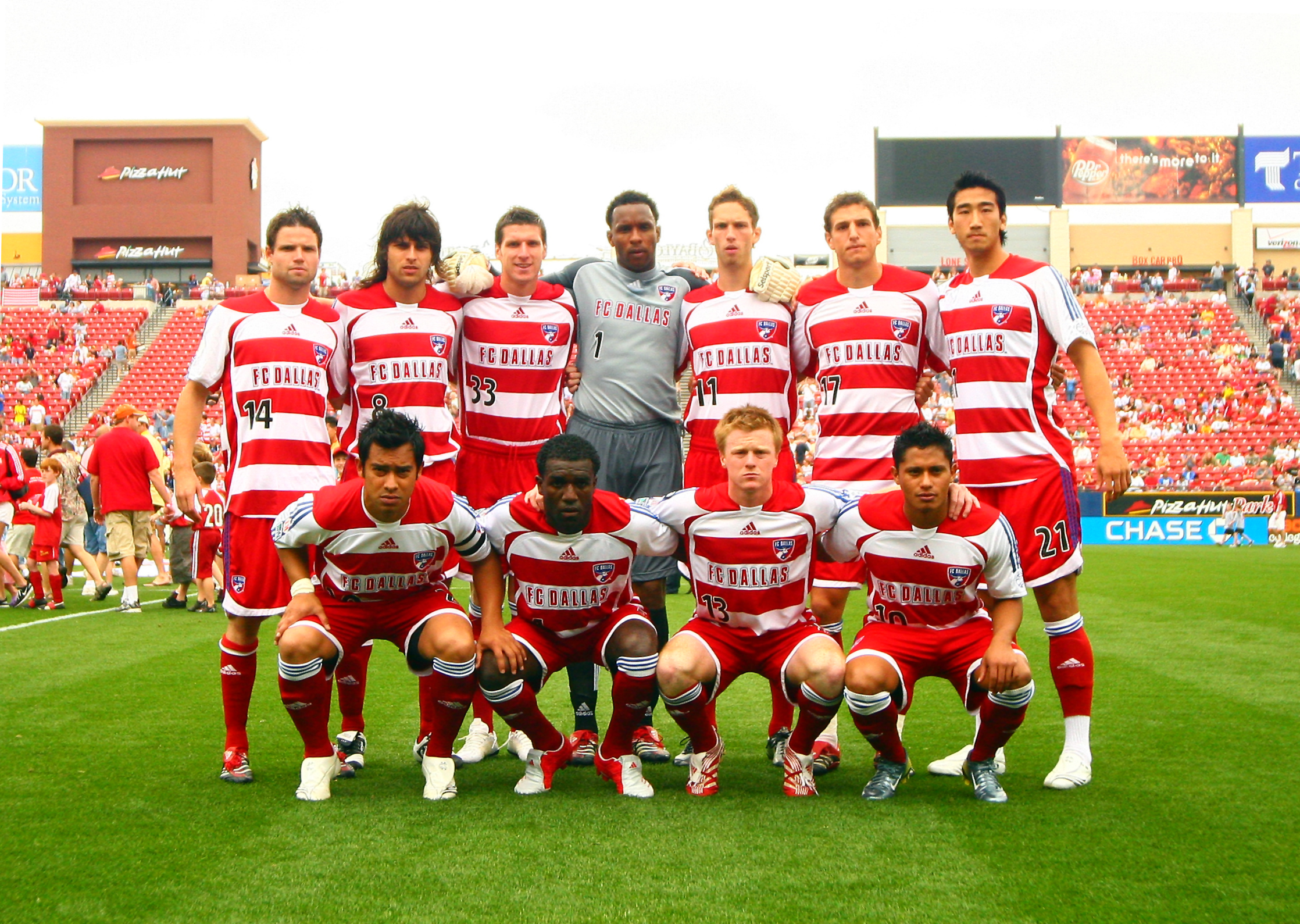 Teamphoto FC Dallas (vs. Colorado Rapids 2007)